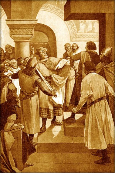 Věnceslav Černý - Výstup mezi Václavem I. a císařem Fridrichem II.